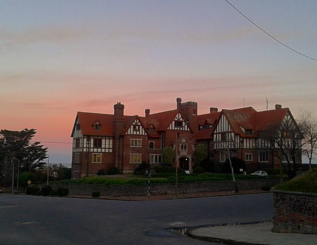 La Catedral Argentina del Golf.